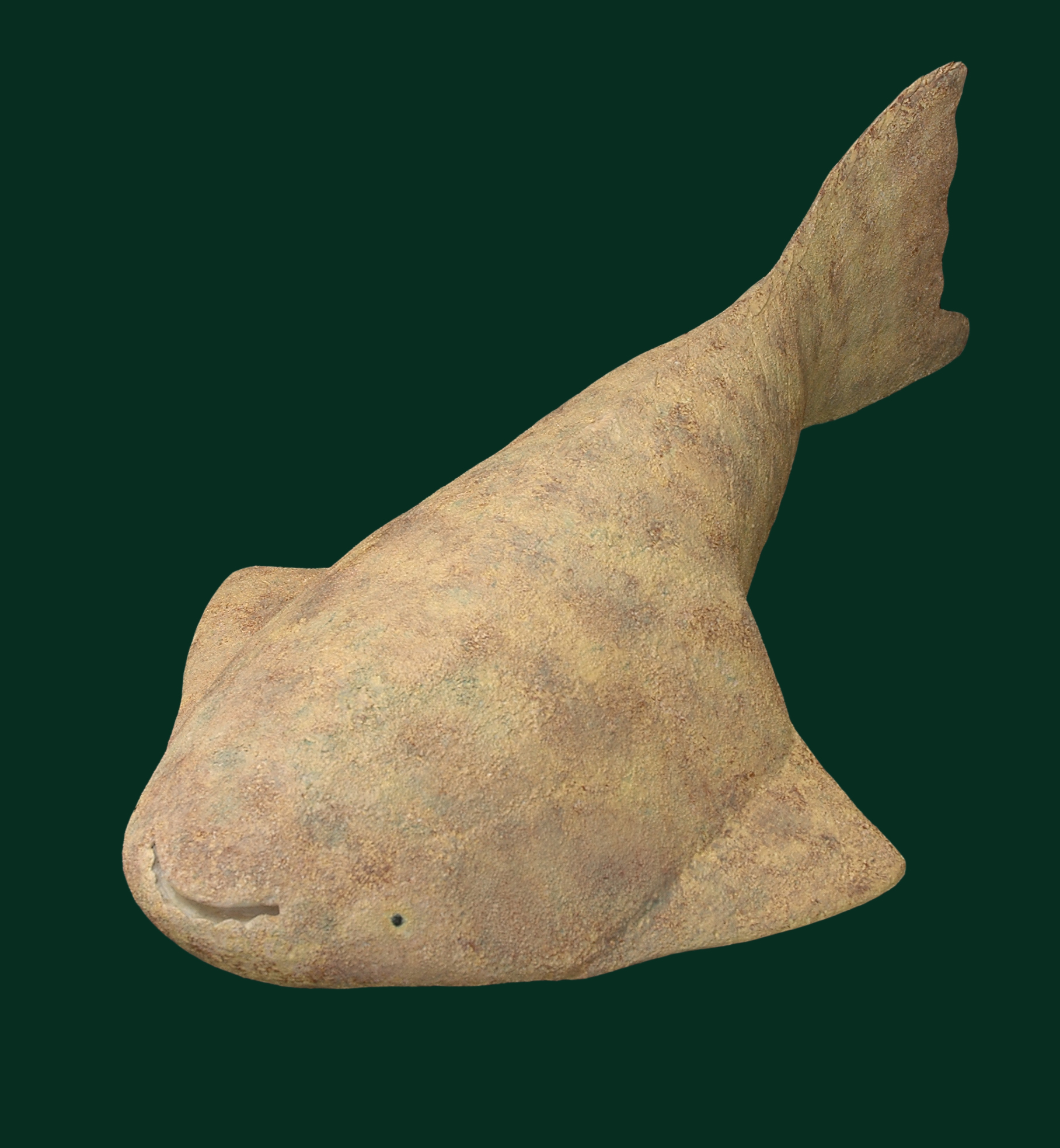 Psammolepis alata rekonstruktsioon. Autor Elga Mark-Kurik